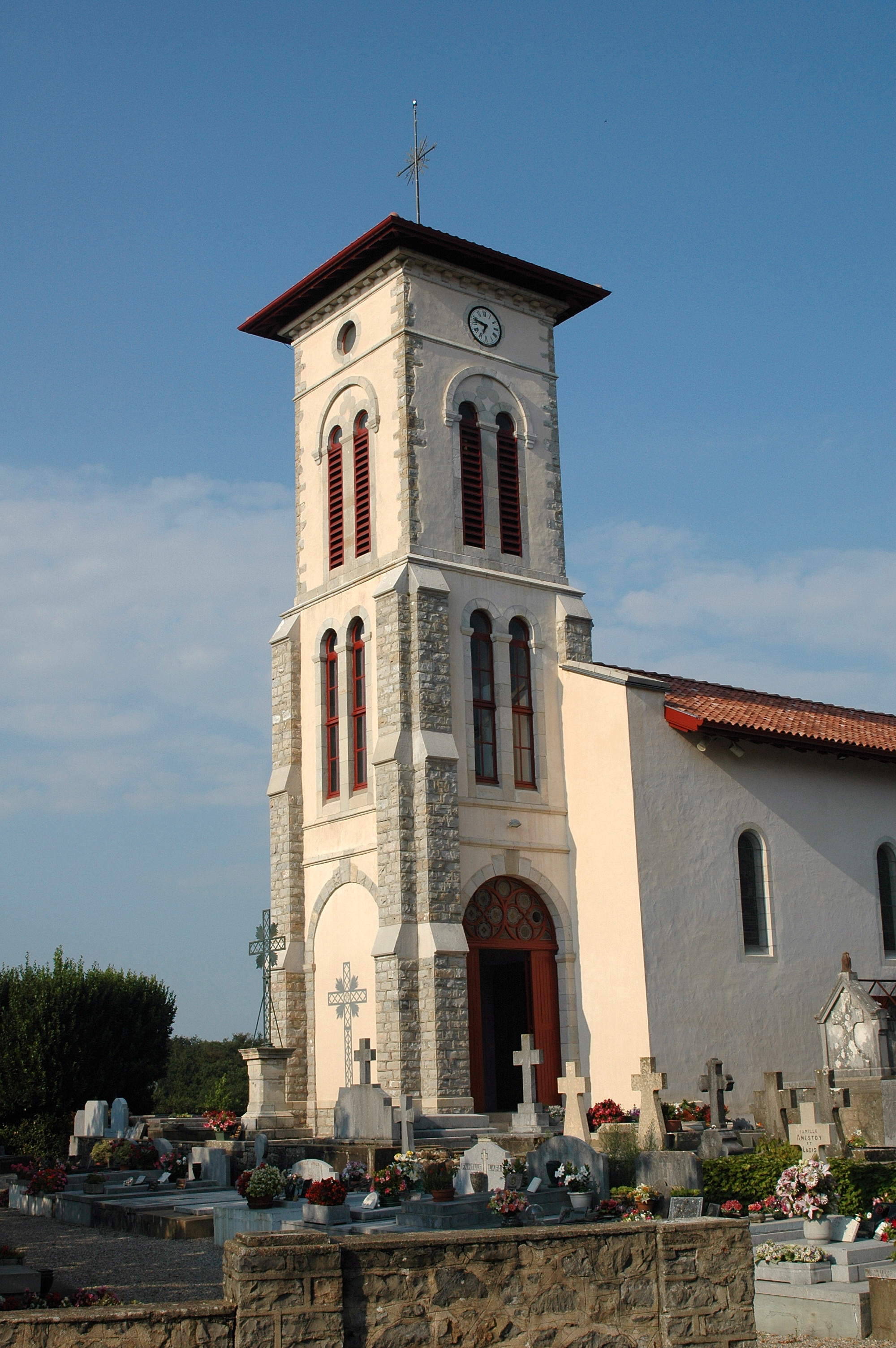 Bassussarry, l'église Saint-Barthélemy. Photo prise le 07/08/06 par Harrieta171